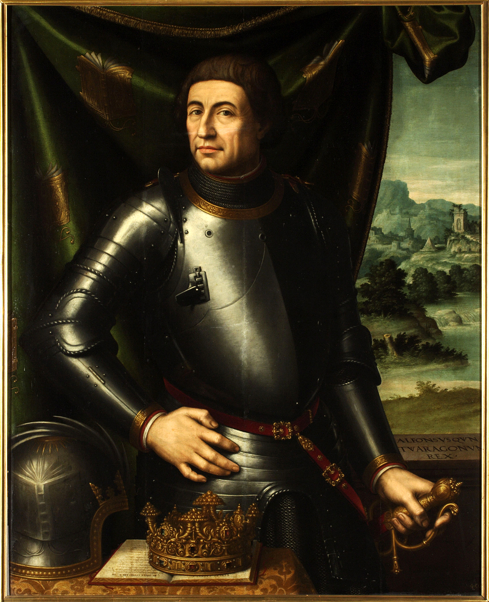 Juan de Juanes se basó en un retrato de Pisanello. Alfonso V de Aragón (1416-1458) viste armadura de época de Carlos I de España. La cabeza sin cubrir expresa su condición pacífica. En primer término, encima de la mesa, se presentan objetos significativos: corona (rey), yelmo (conquistador) y libro abierto (cultura). Este último denota su amor por la cultura y figura asimismo en la corona, la cortina del fondo, el pomo de la espada y el lateral del casco. La corona está ornamentada con piedras preciosas en su aro y cuernos de la abundancia, símbolo de la prosperidad. El libro muestra título y autor: "DE BELLO CIVILI LIB. I" y "C. IVLI. CAESARIS" (La guera civil de Julio César), y une la condición militar con la sabiduría, las armas y las letras. A través del ventanal se observa un paisaje con ruinas romanas, y se ha postulado que aparece el Castel Nuovo de Nápoles, residencia del rey de Aragón tras su conquista de Nápoles.